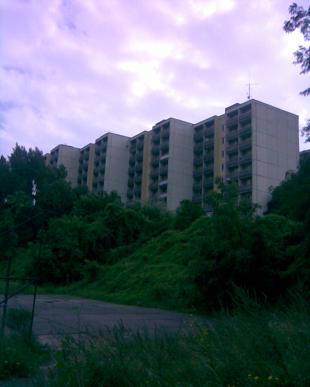 Internáty_Mlynská_Dolina